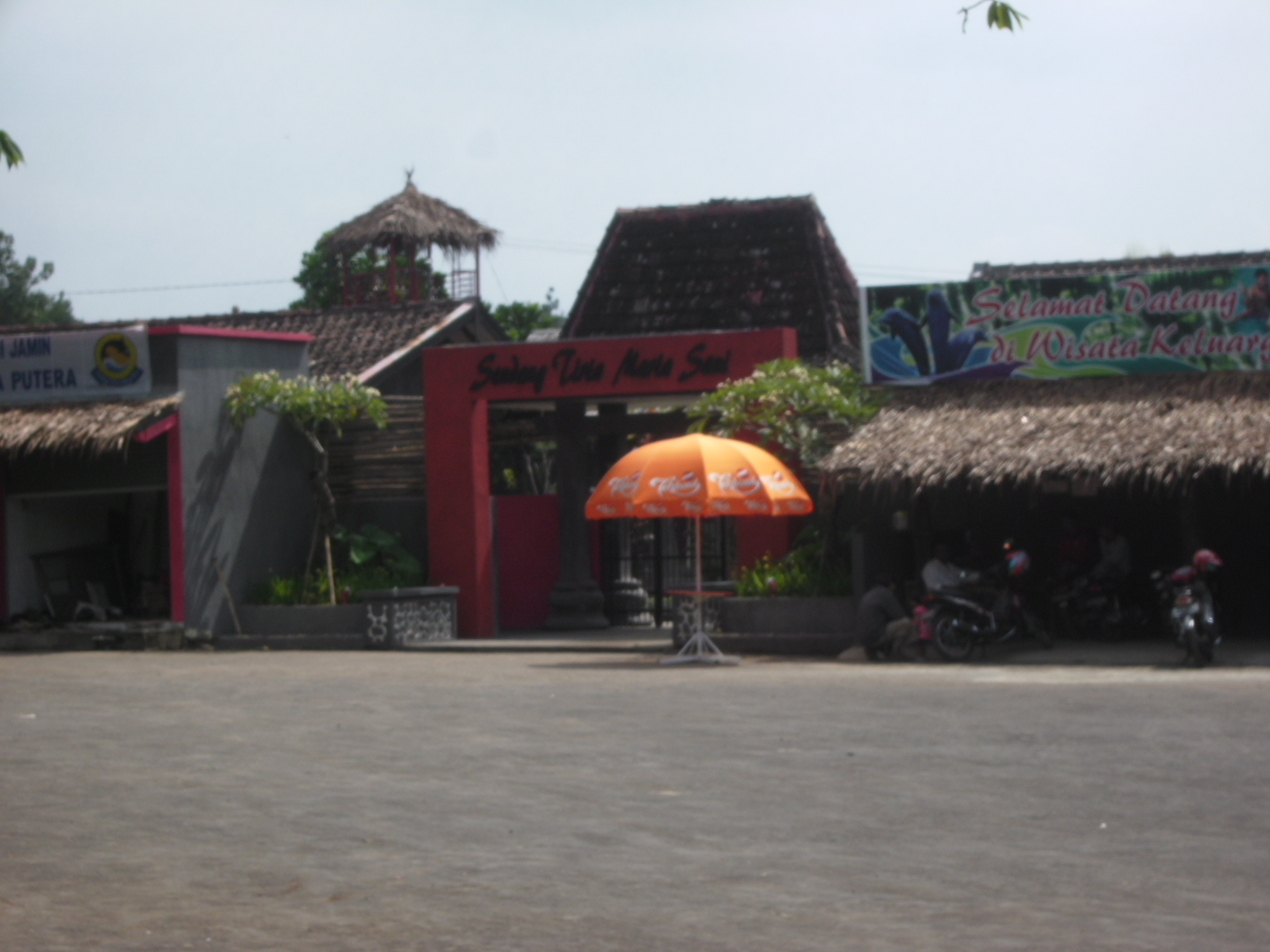 Objek wisata Sendang Sani yang terletak di Tlogowungu Kabupaten Pati